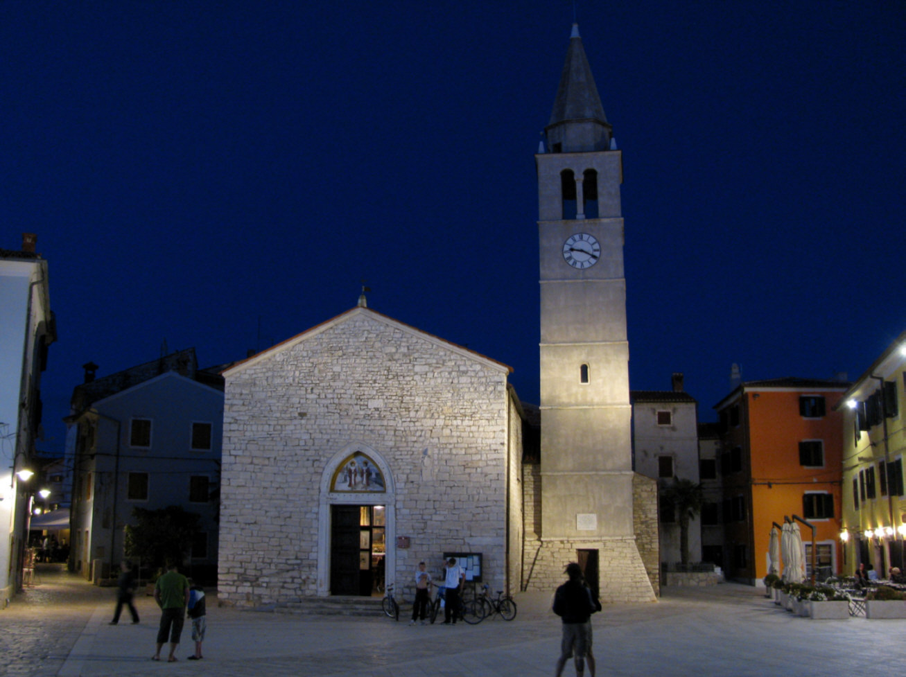 Laubenkirche Maria vom Berg Karmel (14. Jht.) in Fažana